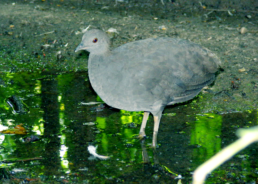 Crypturellus cinereus in/em/en Brasil